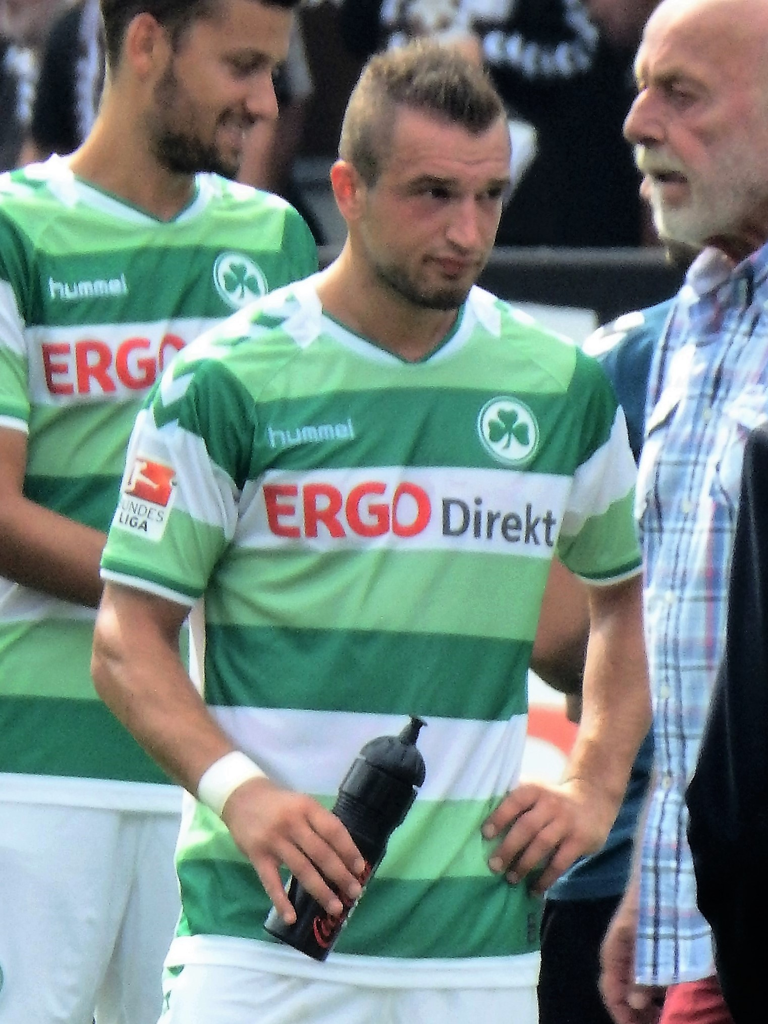 Rodriguez, Roberto Greuther Fürth